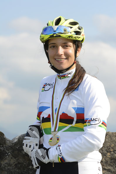 Ramona Forchini, Schweizer Radsportlerin